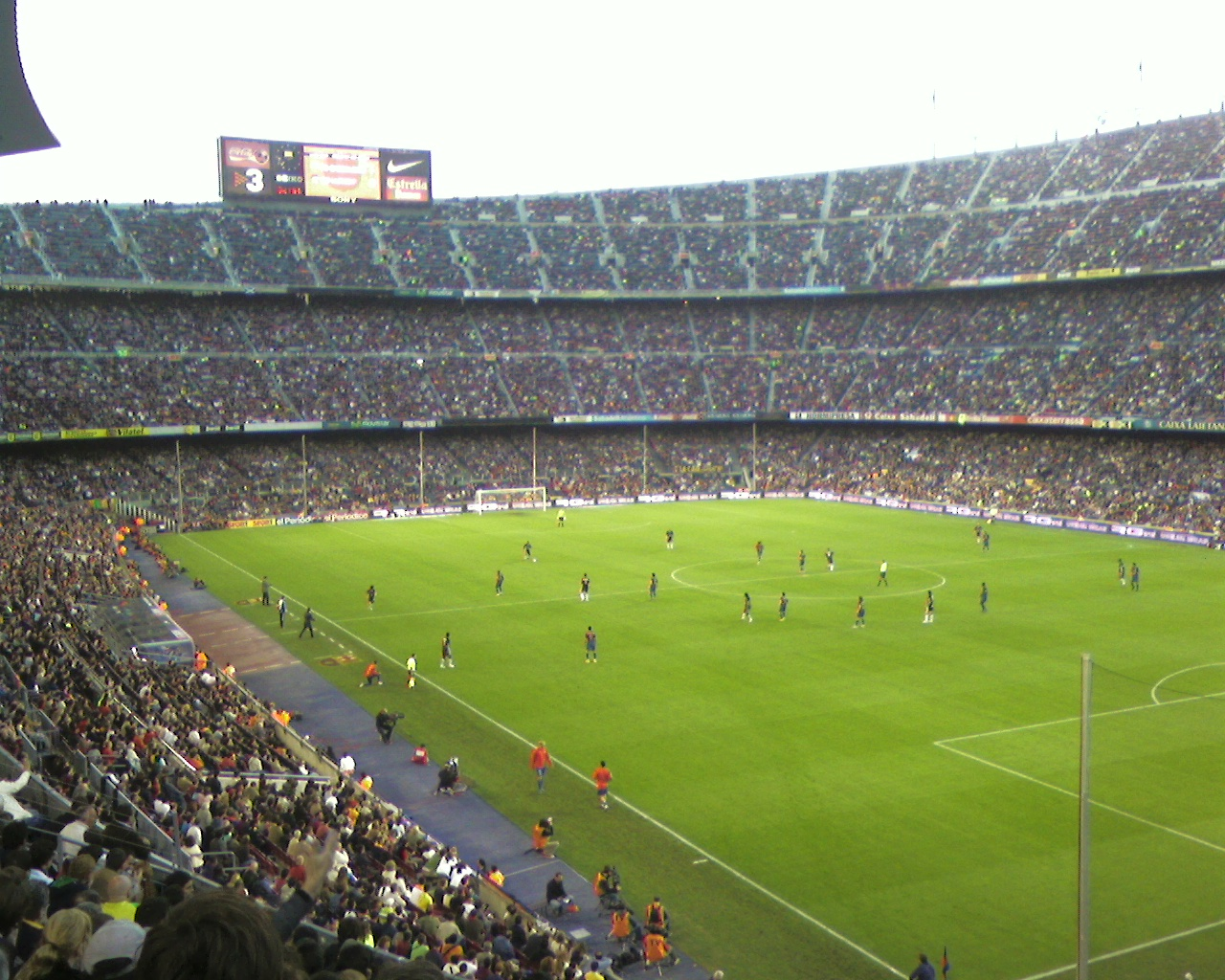 Camp Nou stadium during match Barcelona vs. Levante 29 April 2007